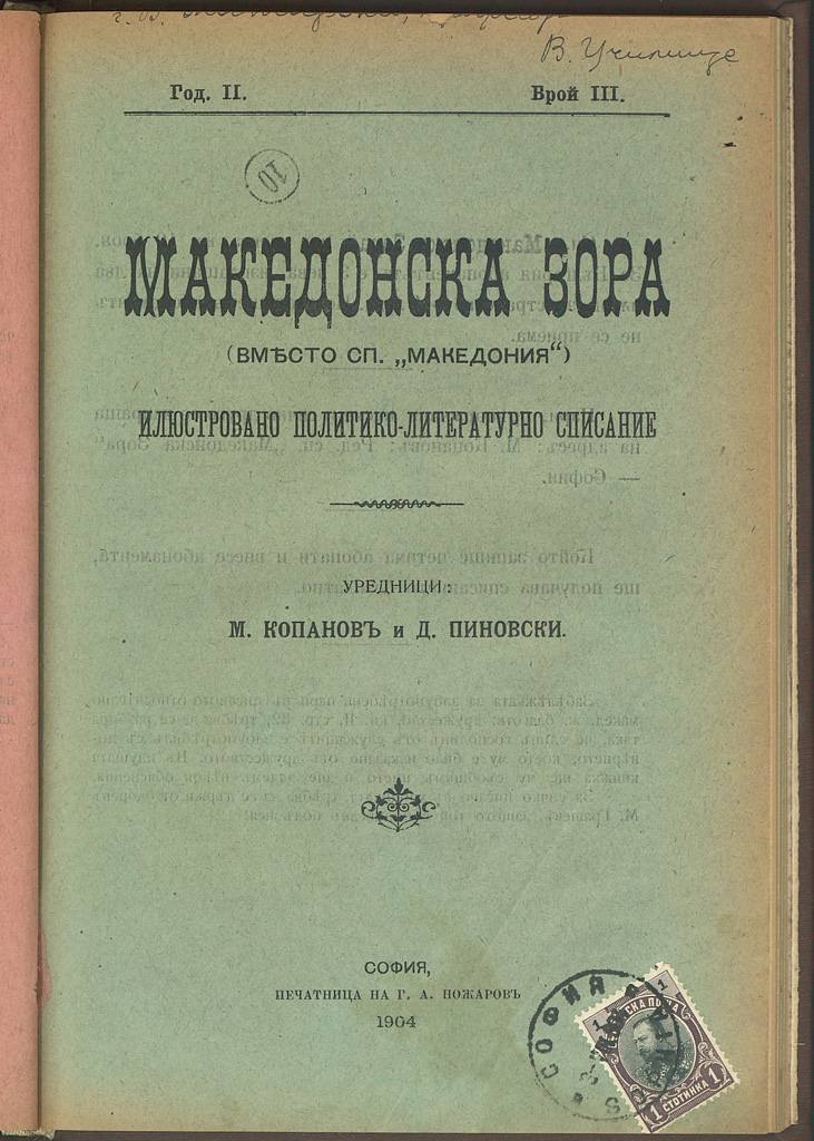 Списание "Македонска зора", година ІІ, брой ІІІ, 1904.